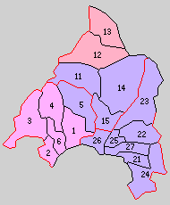 後の鹿児島県姶良郡域の町村制時点の町村。